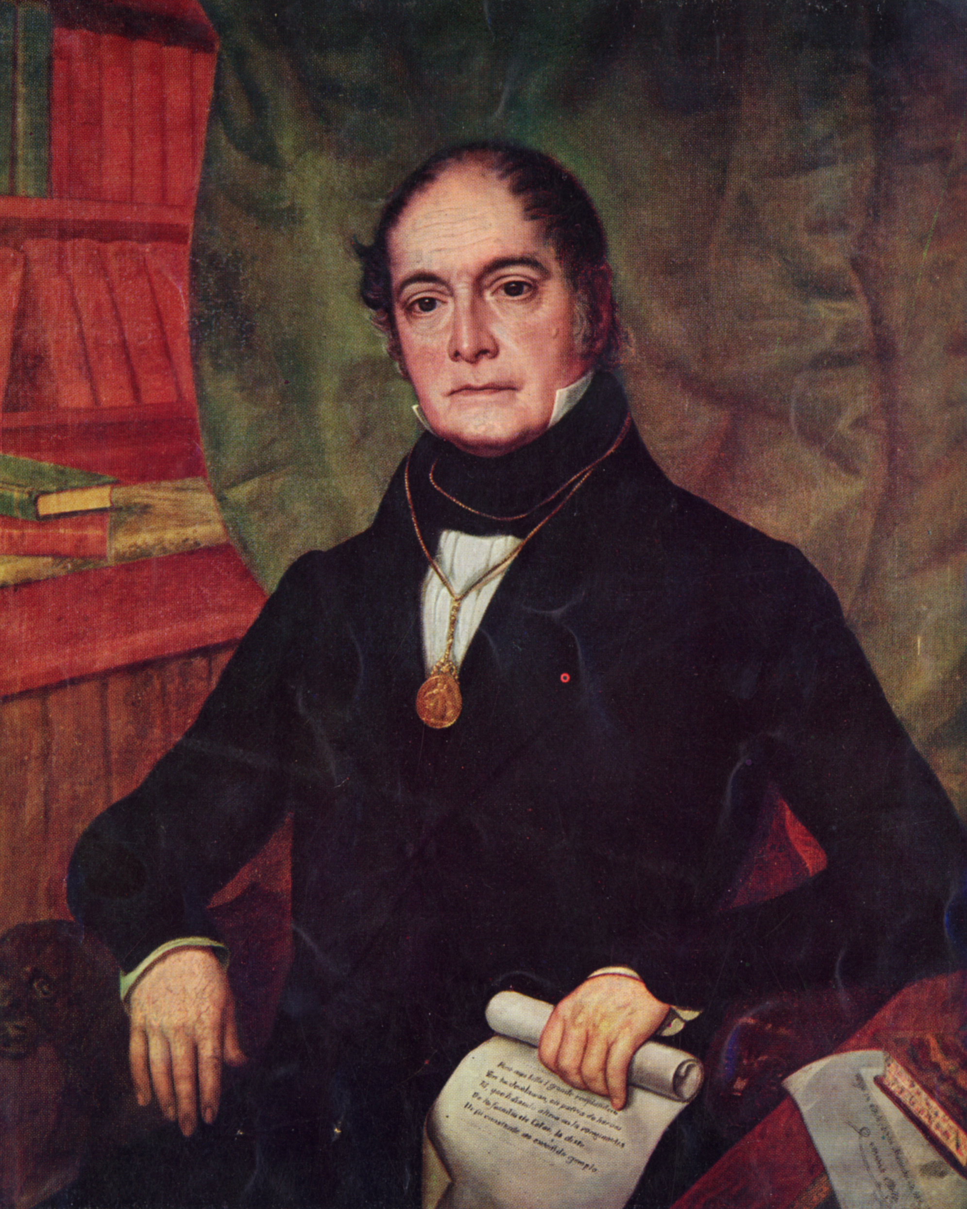 Andrés de Jesús María y José Bello López (n. Caracas, 29 de noviembre de 1781 - m. Santiago de Chile, 15 de octubre de 1865) fue un filósofo, poeta, filólogo, educador y jurista venezolano, considerado como uno de los humanistas más importantes de América.